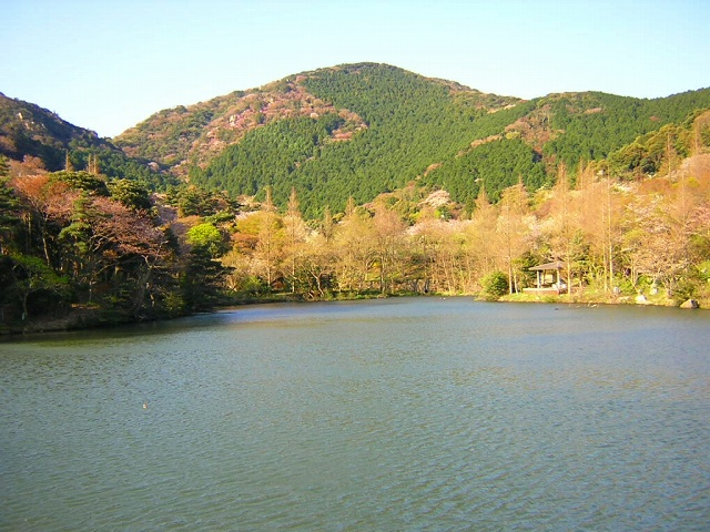 滝頭公園から滝頭山